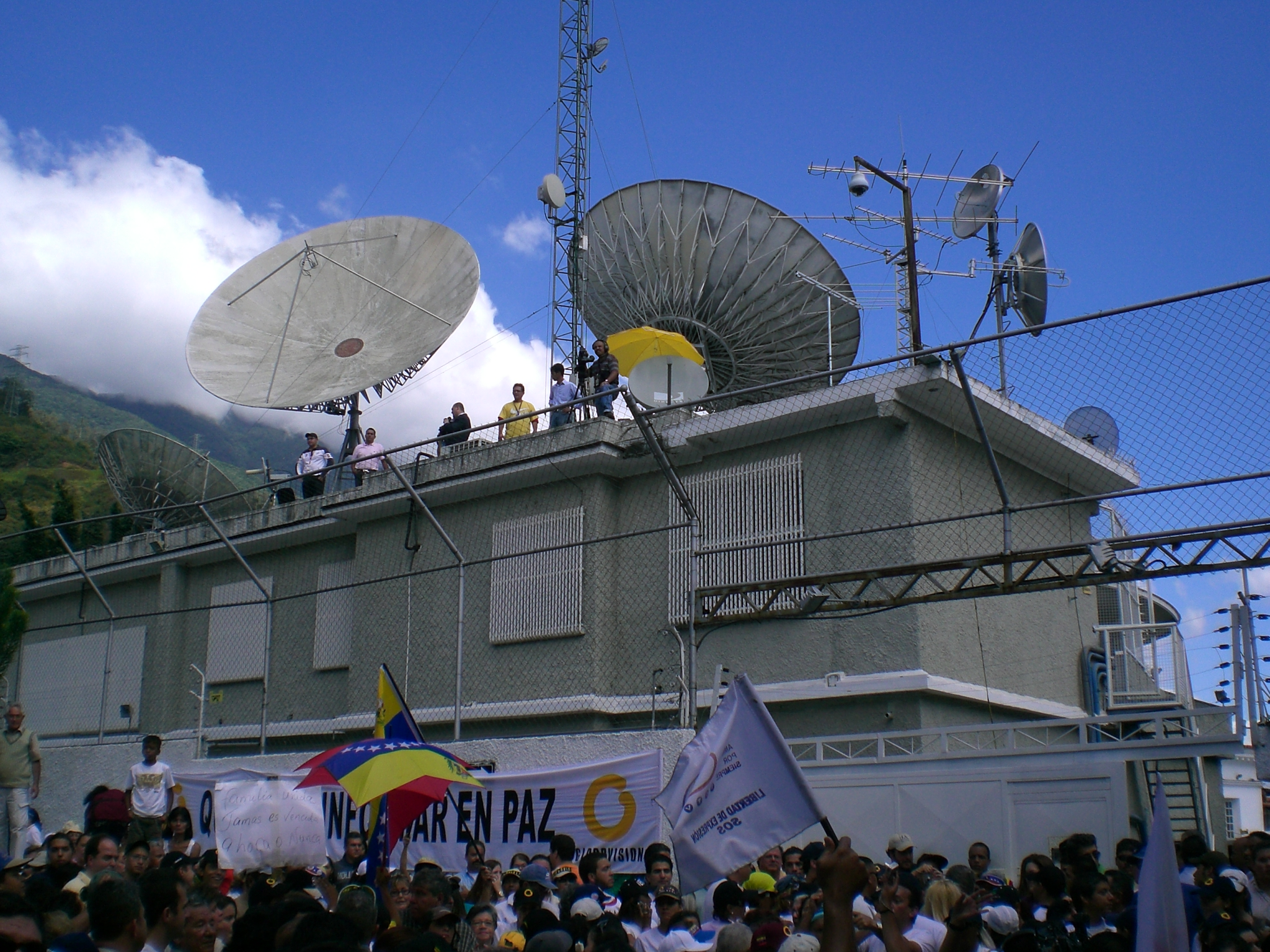 Globovisión building, Caracas, Venezuela